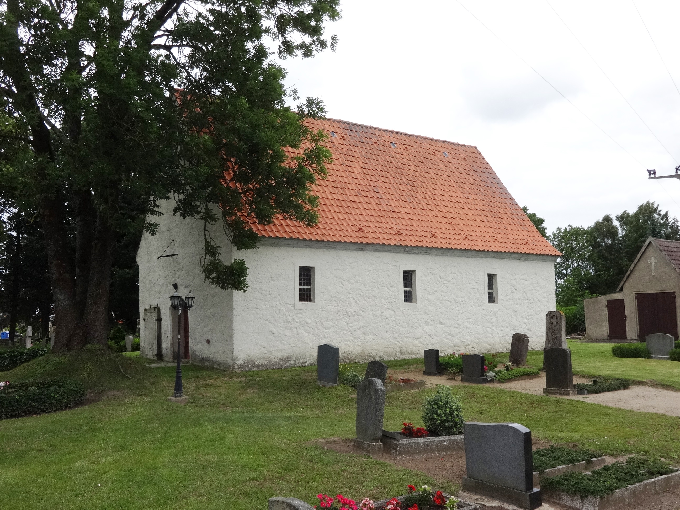 Die Dorfkirche in Klein Bünzow stammt aus dem 13. oder 15. Jahrhundert und befindet sich in der gleichnamigen Gemeinde im Landkreis Vorpommern-Greifswald in Mecklenburg-Vorpommern.